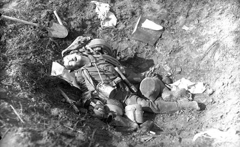 I. Weltkrieg 1914-1918 Revelon Gefallener Deutscher